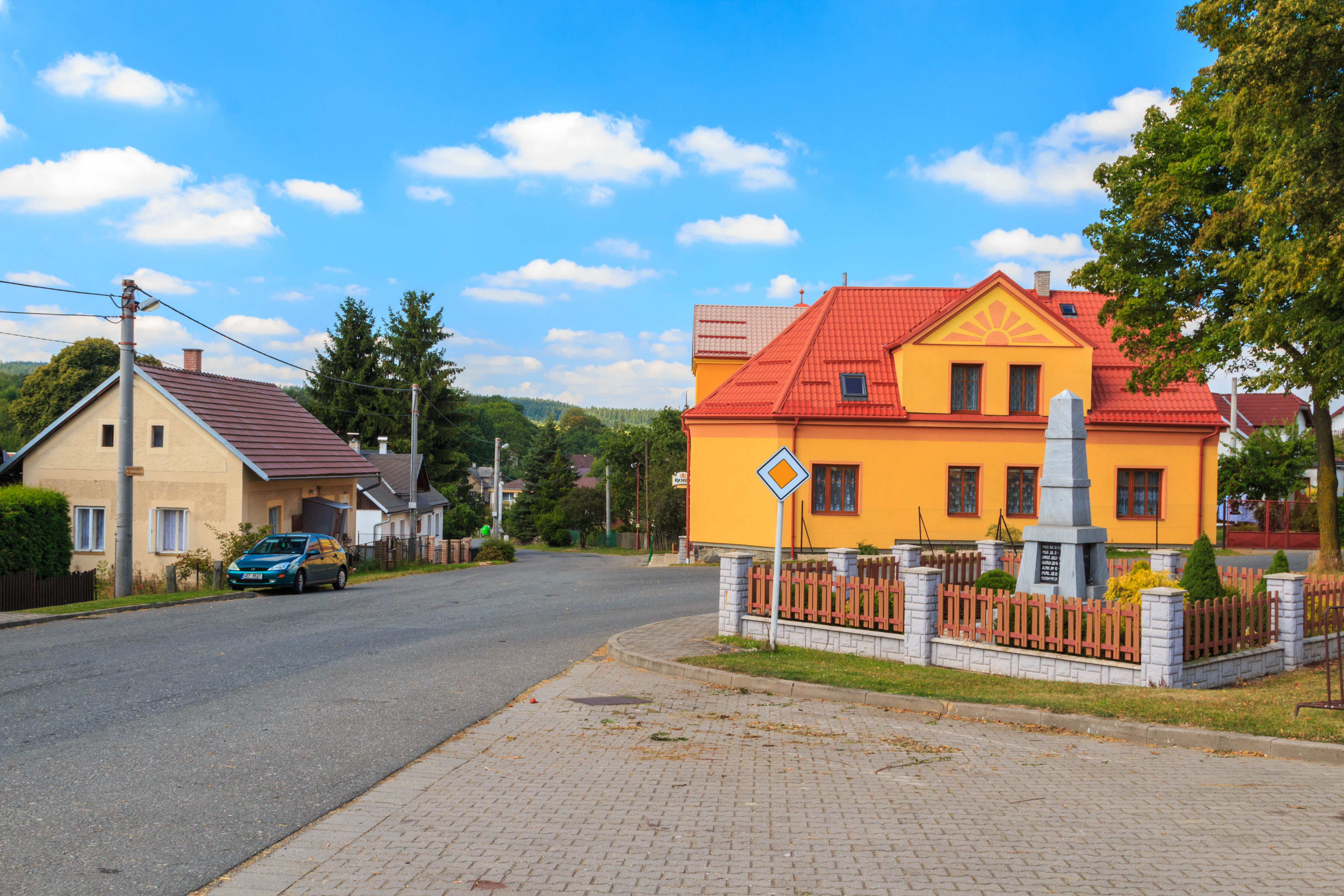 Vojtěchov - čp. 118